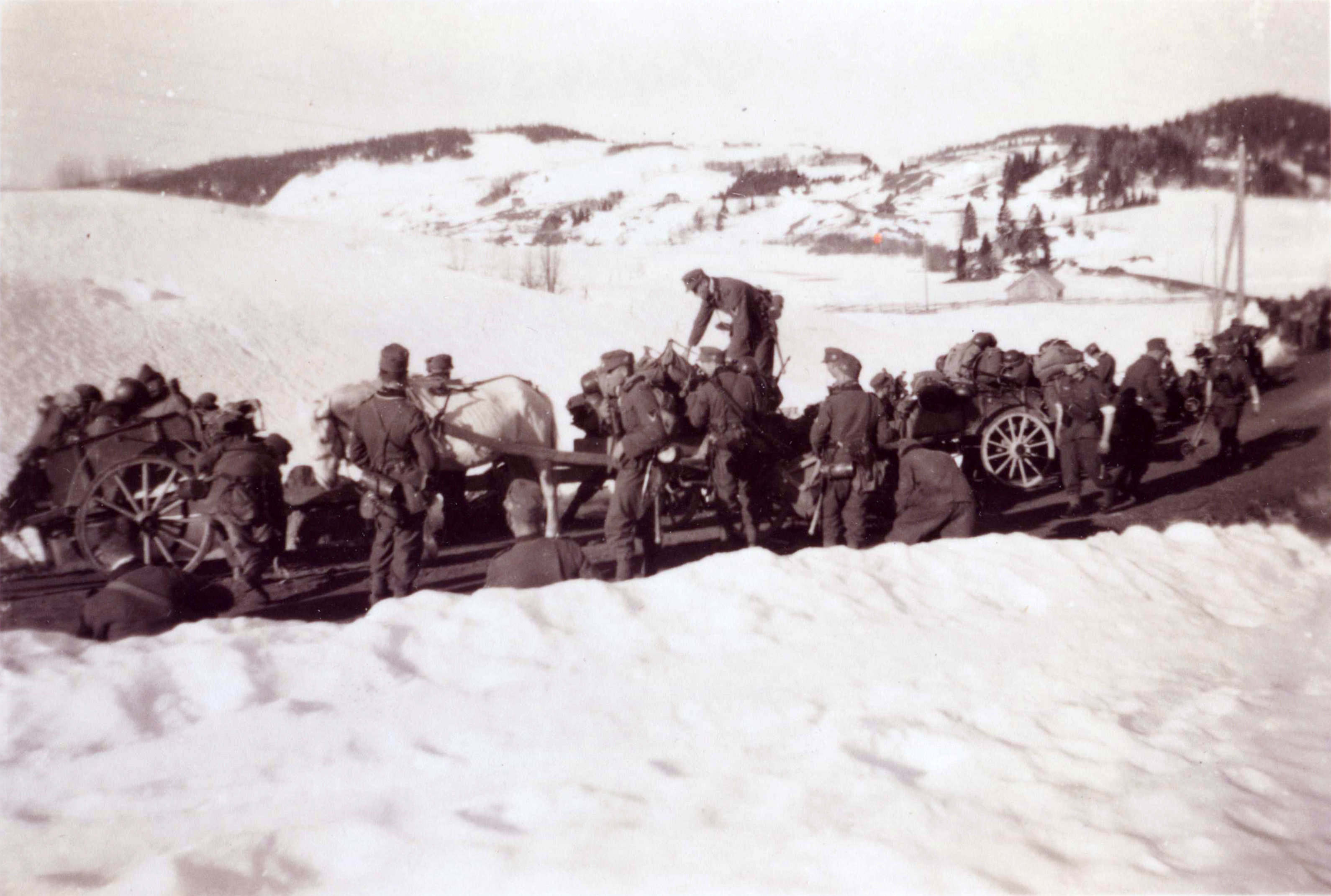 Ved Kvam, Nord-Trøndelag Tittel / Title: Soldater fra 2. bergjegerdivisjon ved Kvam: Nord Trøndelag Mai 1940 Dato / Date: Mai, 1940 Fotograf / Photographer: Franz Hollerweger Sted / Place: Kvam, Trønderlag, Norge Eier / Owner Institution: Arkiv i Nordland Lenke / Link: Arkiv i Nordland Arkivreferanse /Archive reference: AIN.NA143.0128 Fra Dag Skogheims Privatarkiv Tekst bak på bildet: Mai 1940, vormarsch am Snaasasee-Grong. Vercadung auf die Norwegischen karretten der ergebenen 5. Norw. Brigade. Bergjegerne har tatt en rast. Det har sikret seg masse proviant etter at trønderbataljonen har kapitulert. Bildet er sansynligvis tatt i nærheten av Kvam.